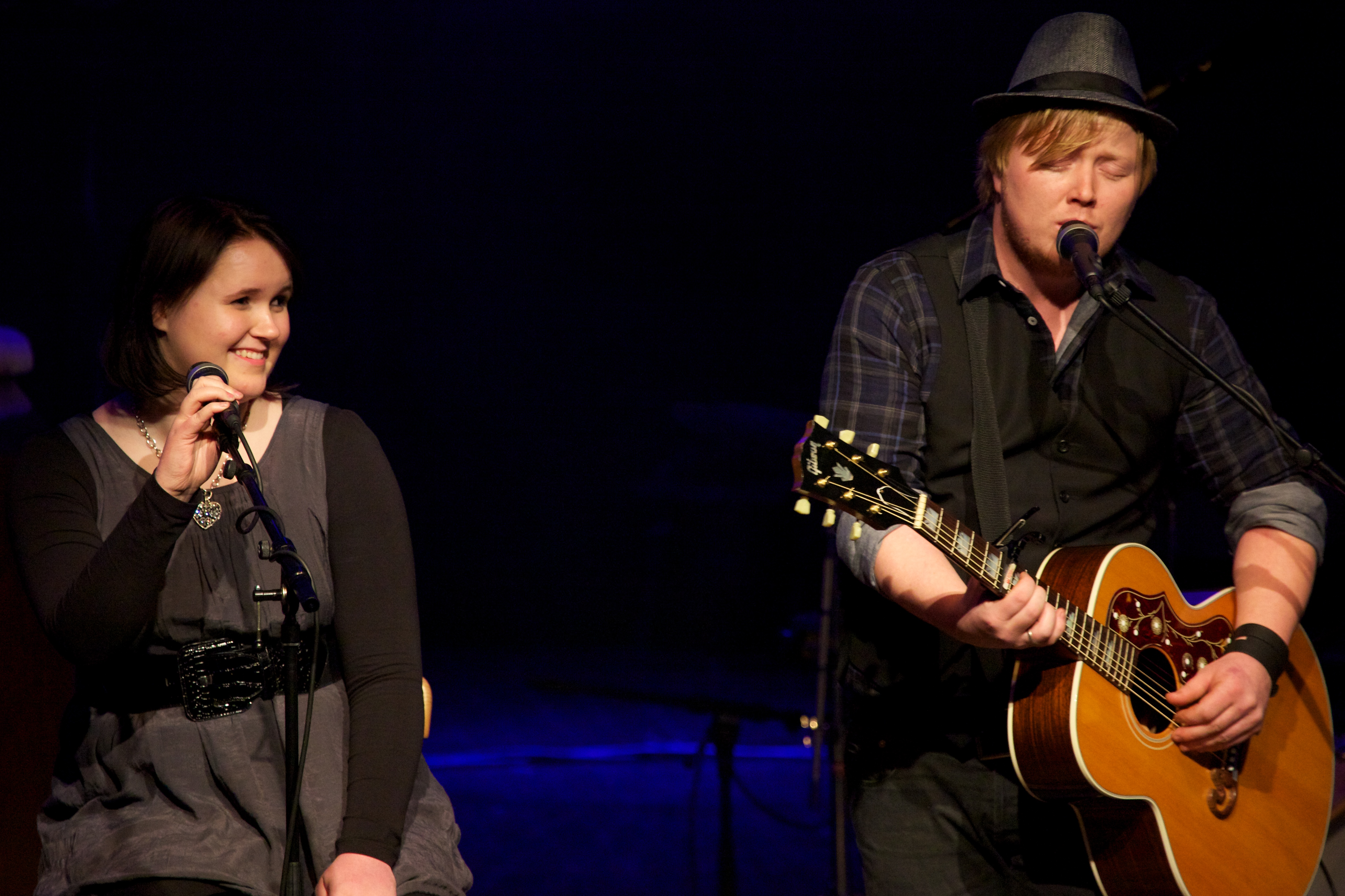 Elin Gaustad og Knut Nilsen i Ibsenhuset i Skien